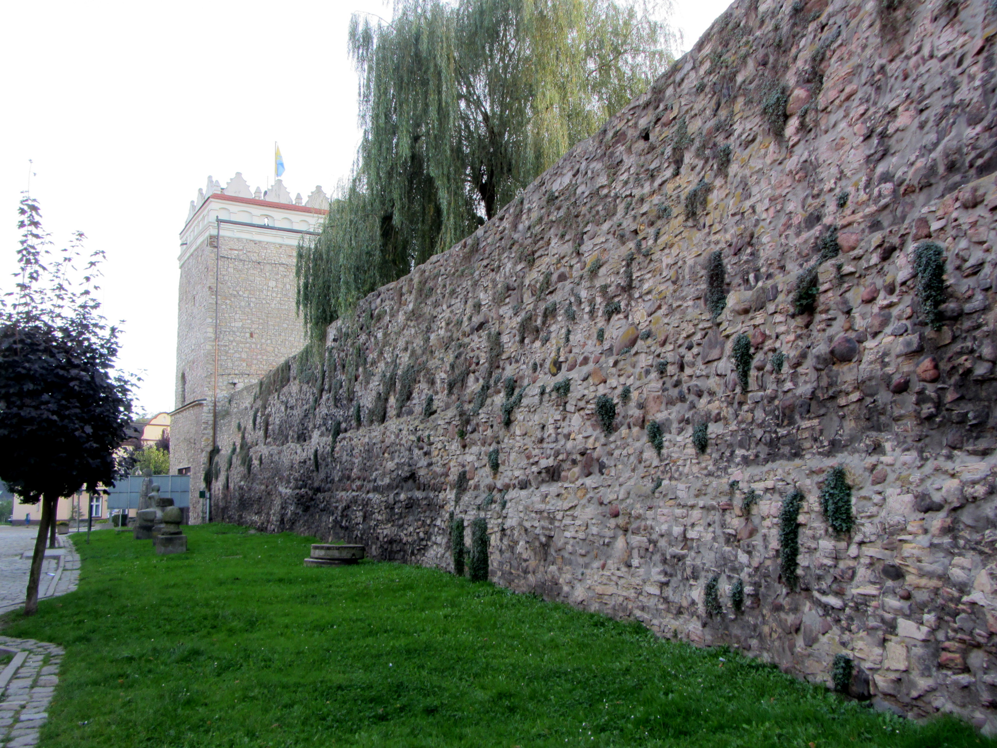 Krapkowice, mury obronne (fragment), 2 poł. XIV, XVI